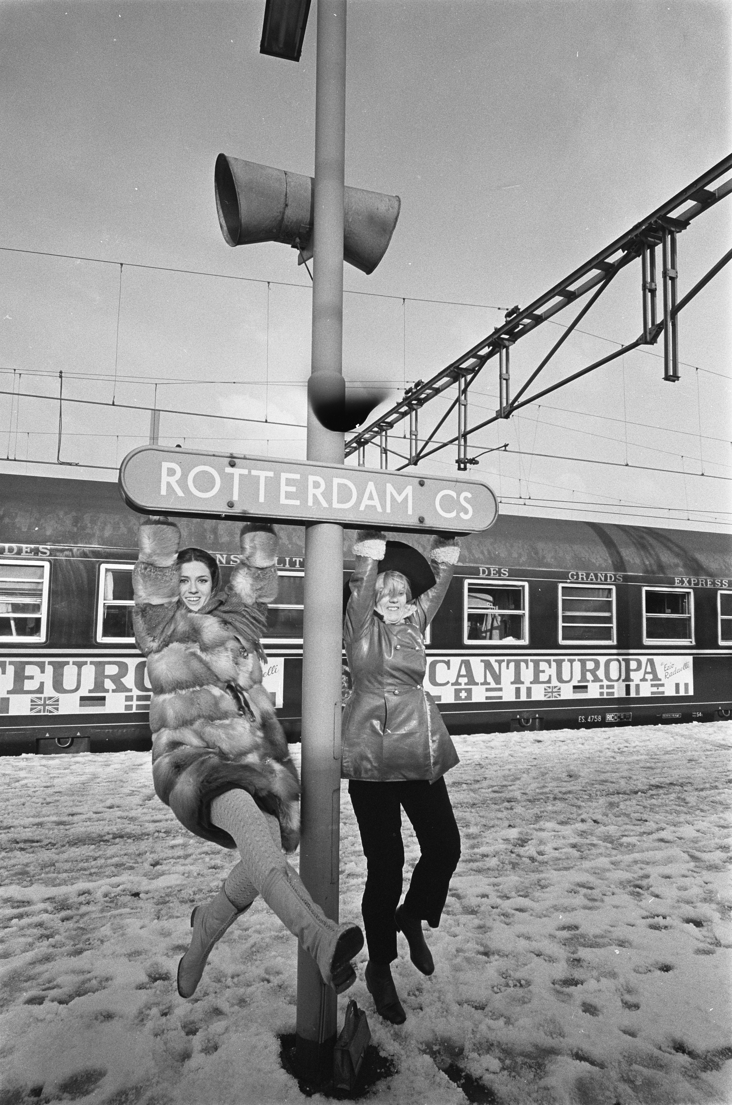 Collectie / Archief : Fotocollectie Anefo Reportage / Serie : [ onbekend ] Beschrijving : Aankomst Italiaanse artiesten op Rotterdam Centraal Station. Gigliola Cinquetti (links) en Catarina Caselli op het perron Datum : 9 december 1967 Locatie : Rotterdam, Zuid-Holland Trefwoorden : aankomsten, spoorwegen, stations, treinen, zangeressen Persoonsnaam : Caselli, Catarina, Cinquetti, Gigliola Fotograaf : Behrens, Herbert / Anefo, [onbekend] Auteursrechthebbende : Nationaal Archief Materiaalsoort : Negatief (zwart/wit) Nummer archiefinventaris : bekijk toegang 2.24.01.05 Bestanddeelnummer : 920-9144